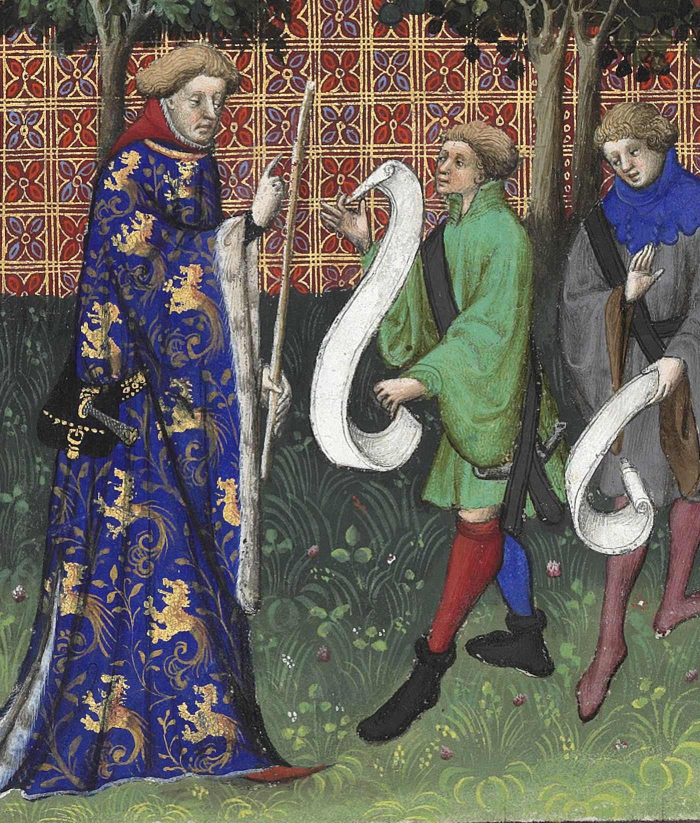 Fébus enseignant aux veneurs, page 51 v du Livre de la Chasse.